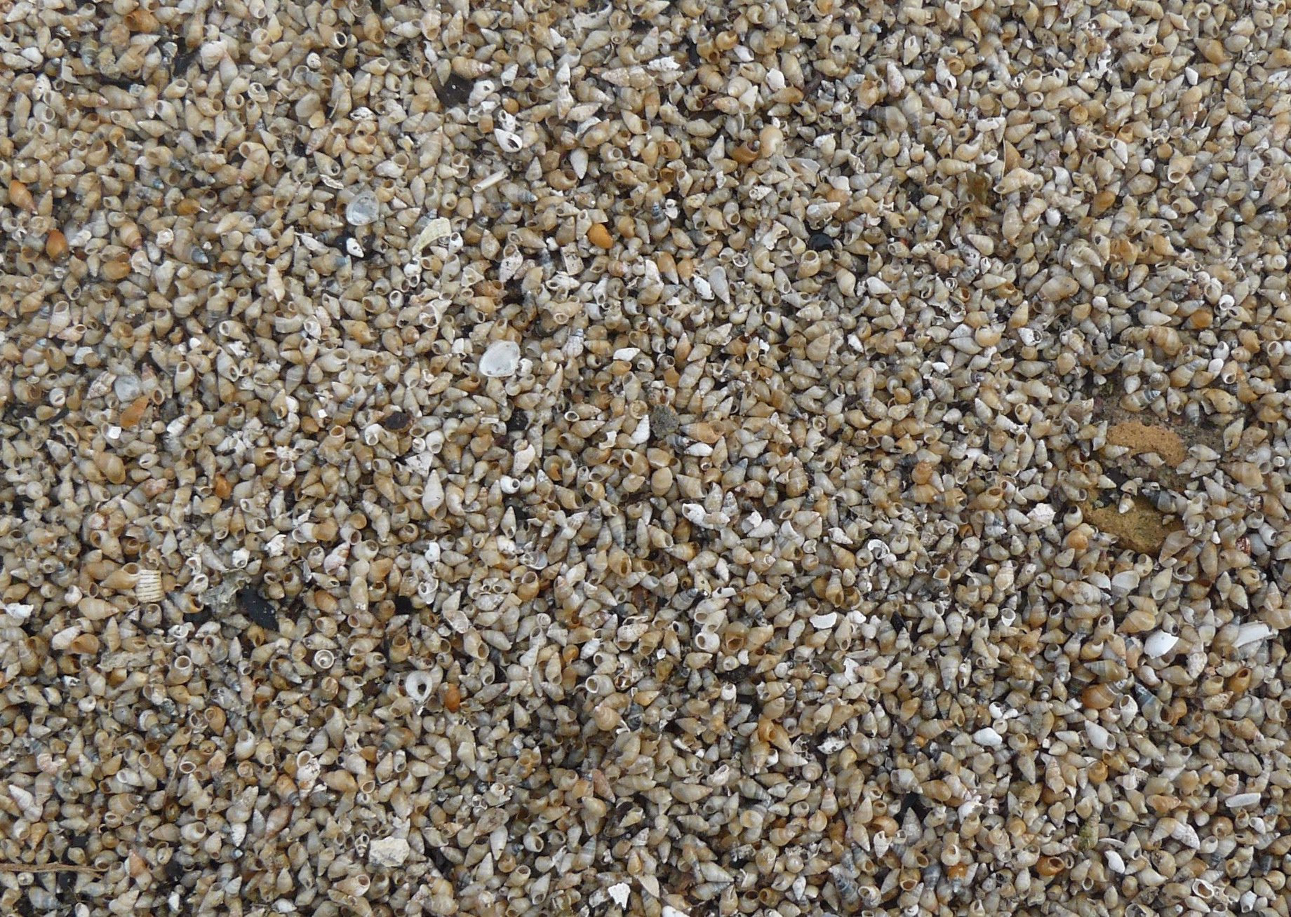 Wad ten Zuiden van Schiermonnikoog; Aanspoelsel aan onderzijde van de dijk bijna geheel bestaande uit Peringia ulvae. Verder zijn enkele losse kleppen van Abra tenuis te zien.